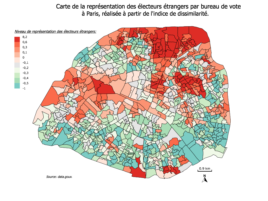 Carte de la représentation des populations étrangères dans les bureaux de vote parisiens.